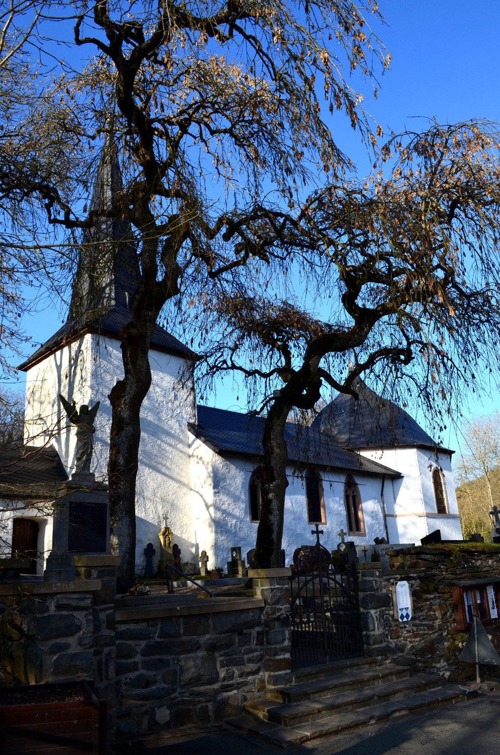 Peterskirche in Ouren, Burg-Reuland